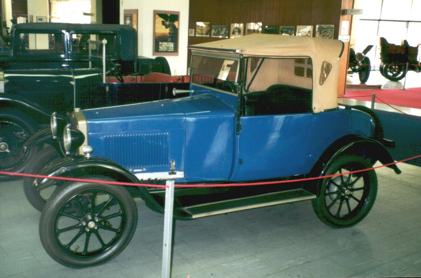 FOD 1926